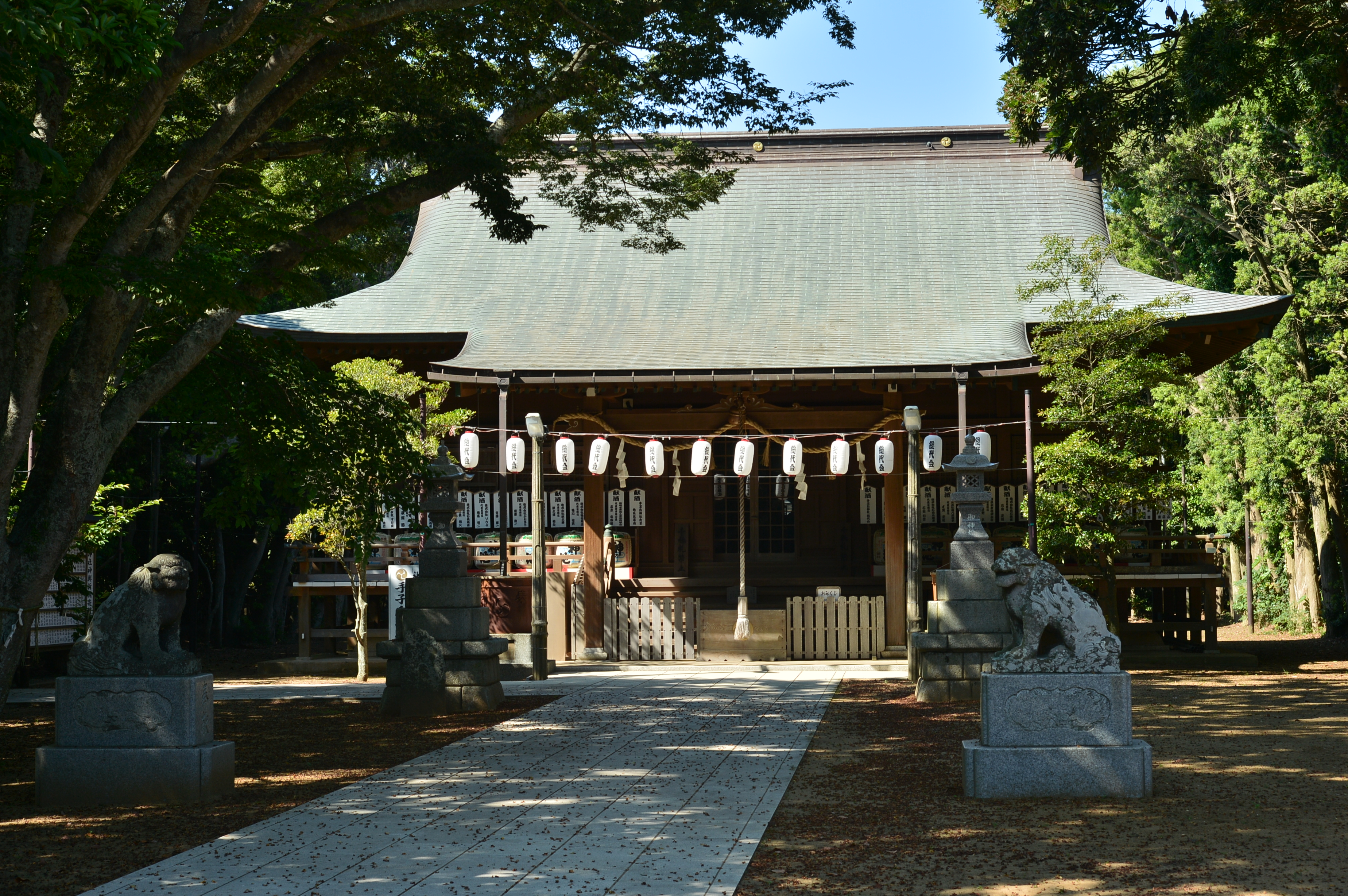 手子后神社の本殿（茨城県神栖市）